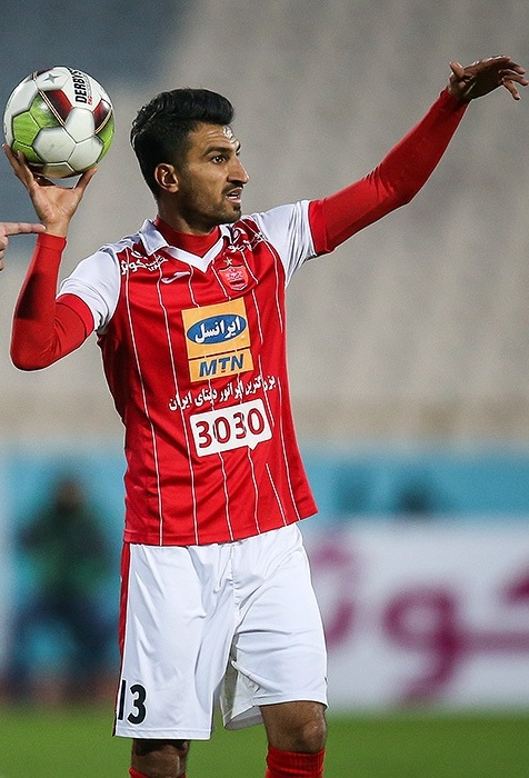 ماهینی در هفته هجدهم لیگ برتر ایران، پرسپولیس در برابر نفت